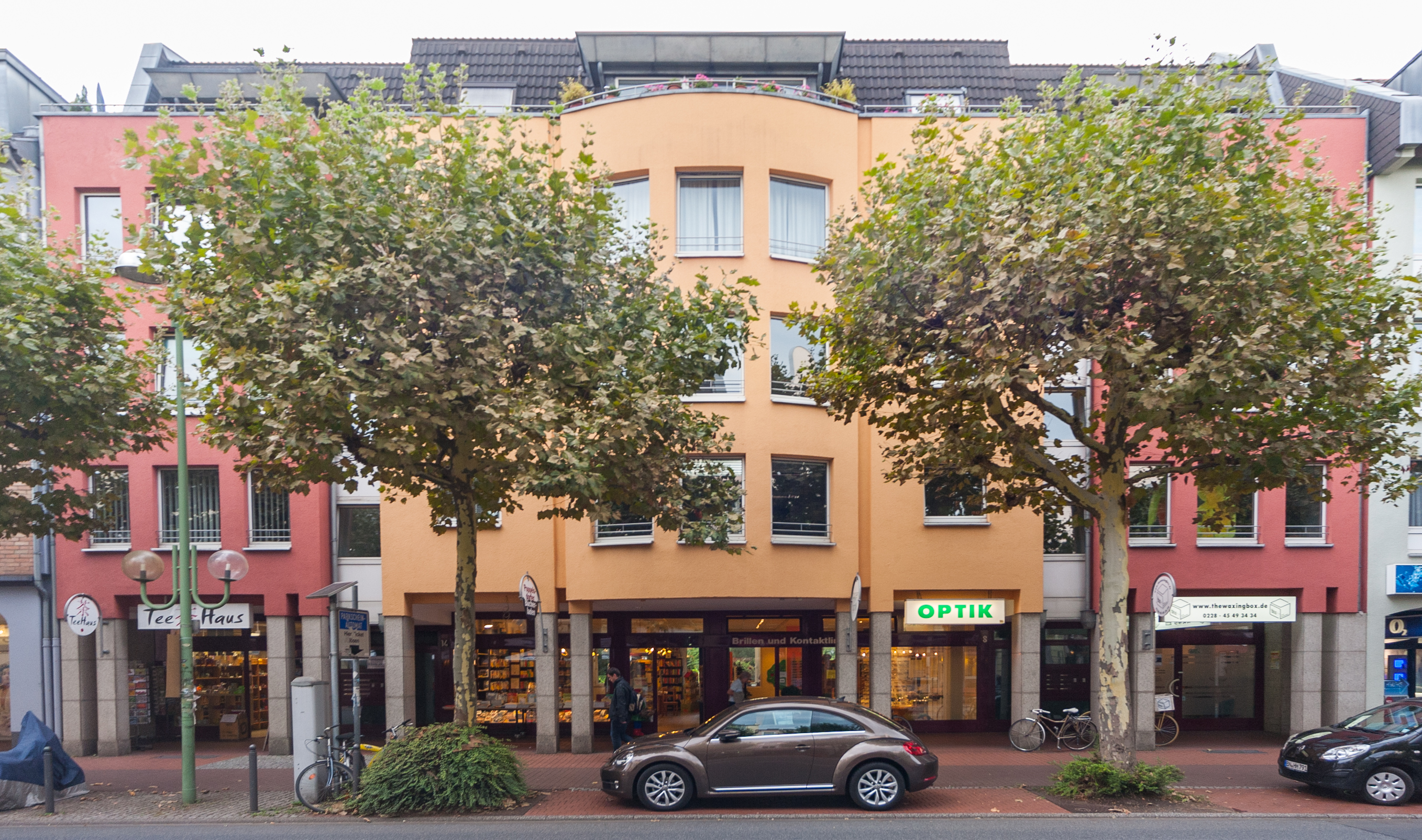 Clemens-August-Straße 8–14, Bonn-Poppelsdorf